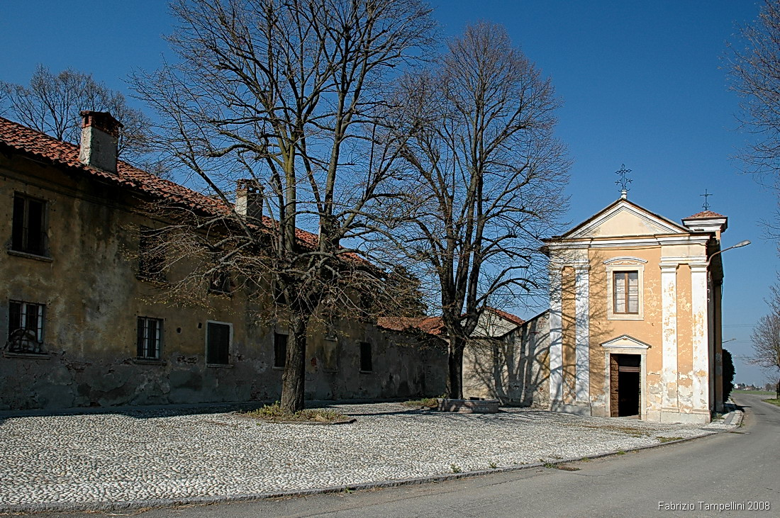 Chiesetta ad Induno